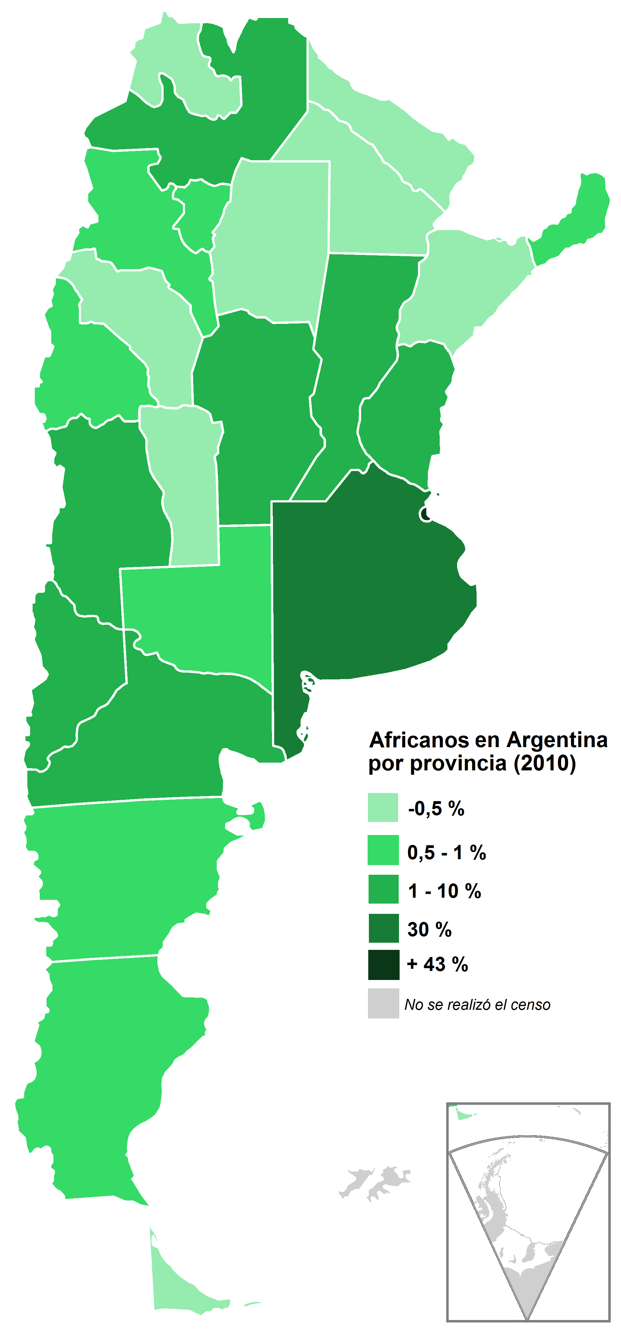 República Argentina por provincia. Población nacida en África, en porcentaje. Año 2010. Fuente: Censo 2010 - INDEC.